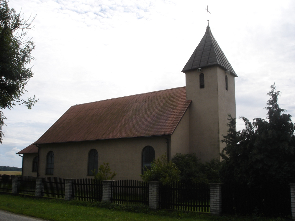 Kościół w Kiczarowie